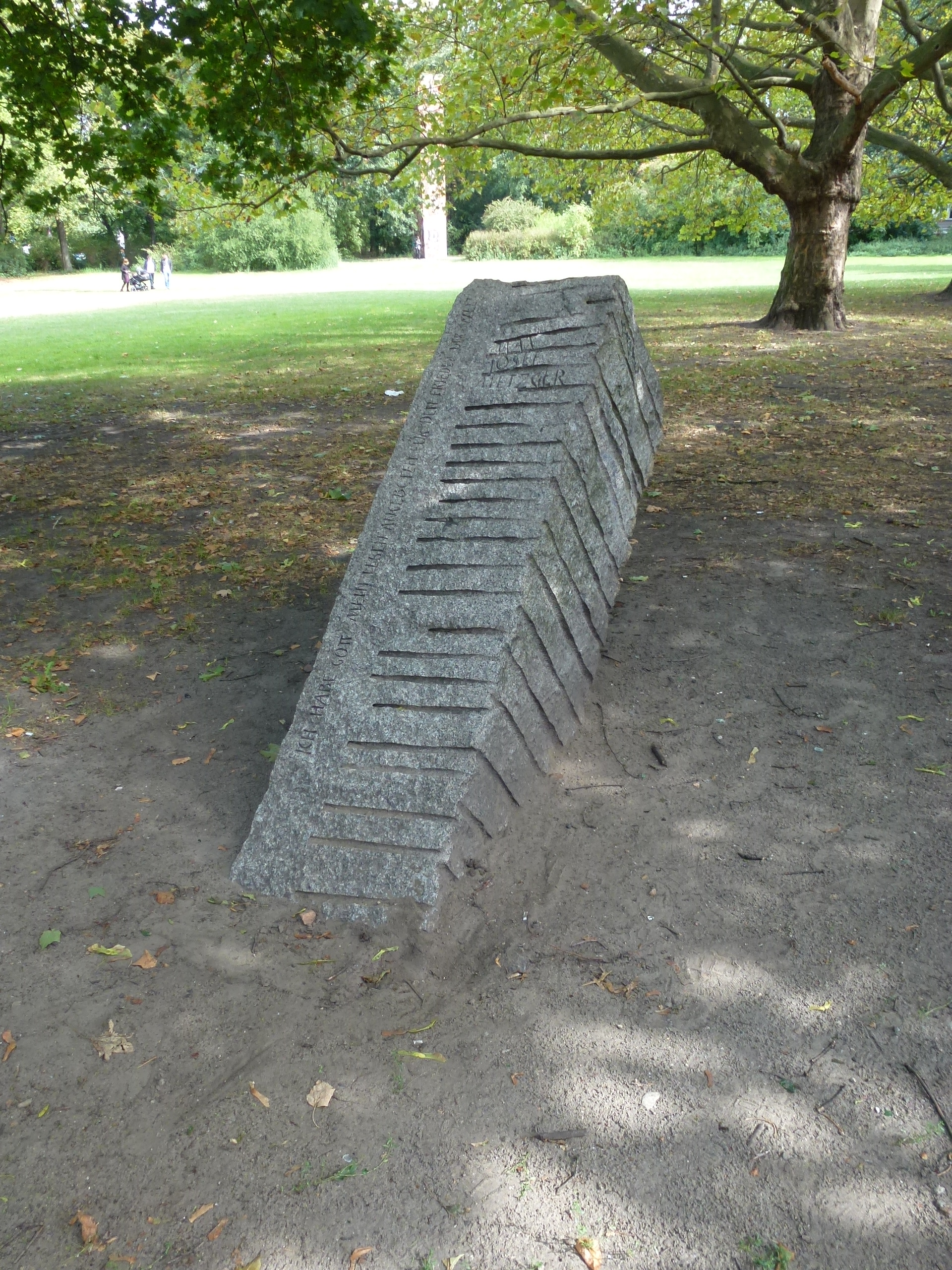 Berlin-Wedding Max-Josef-Metzger-Platz Gedenkstein für Max-Josef Metzger